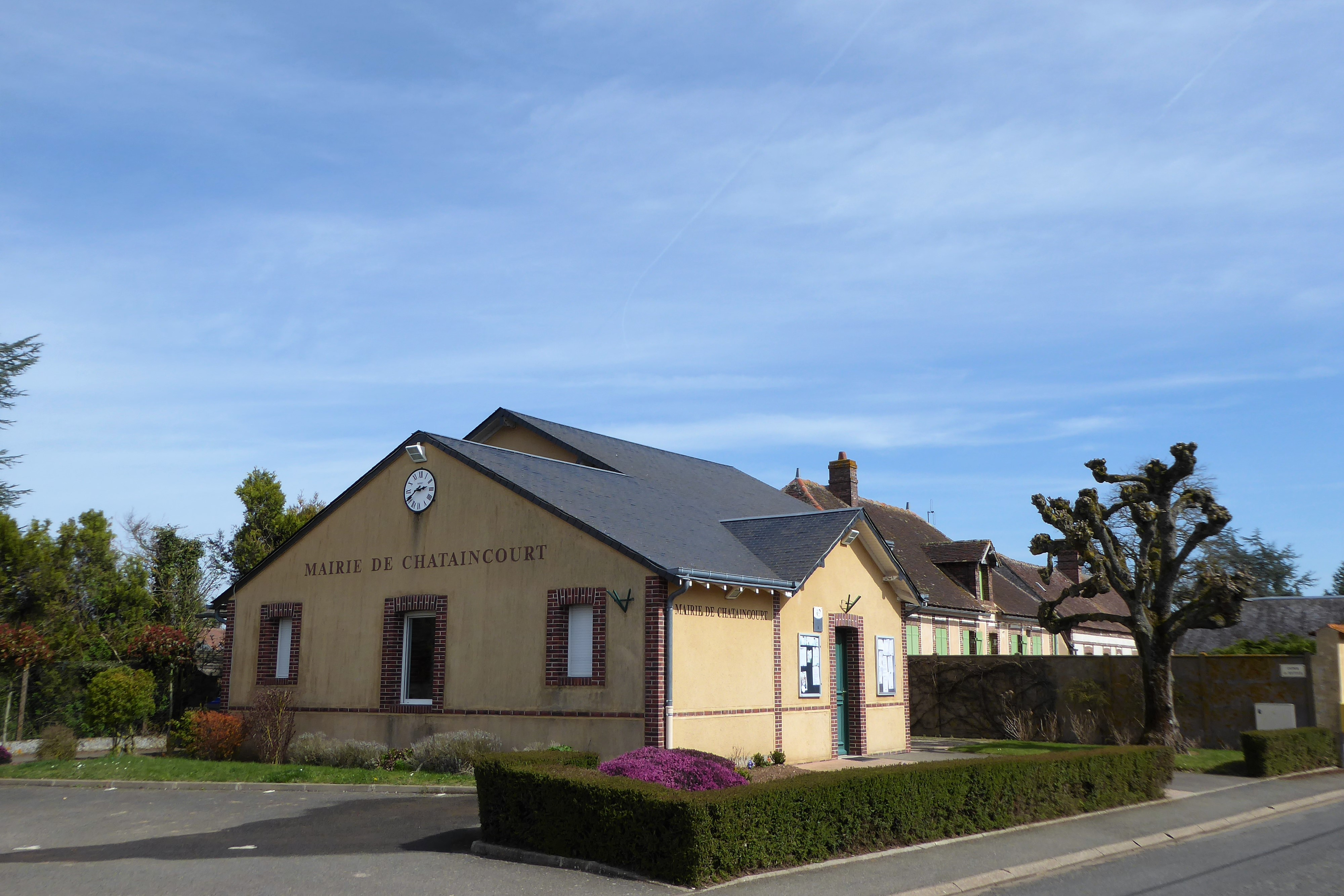 mairie de Châtaincourt, Eure-et-Loir, France.